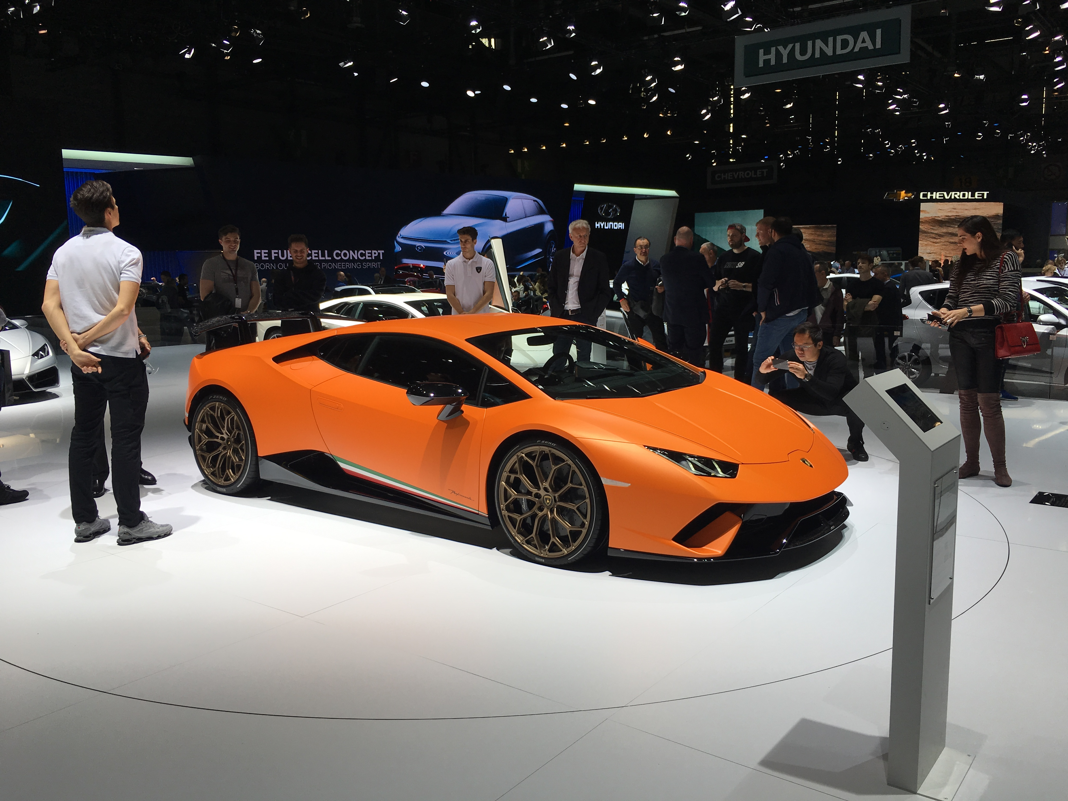 Geneva Auto Salon 2017